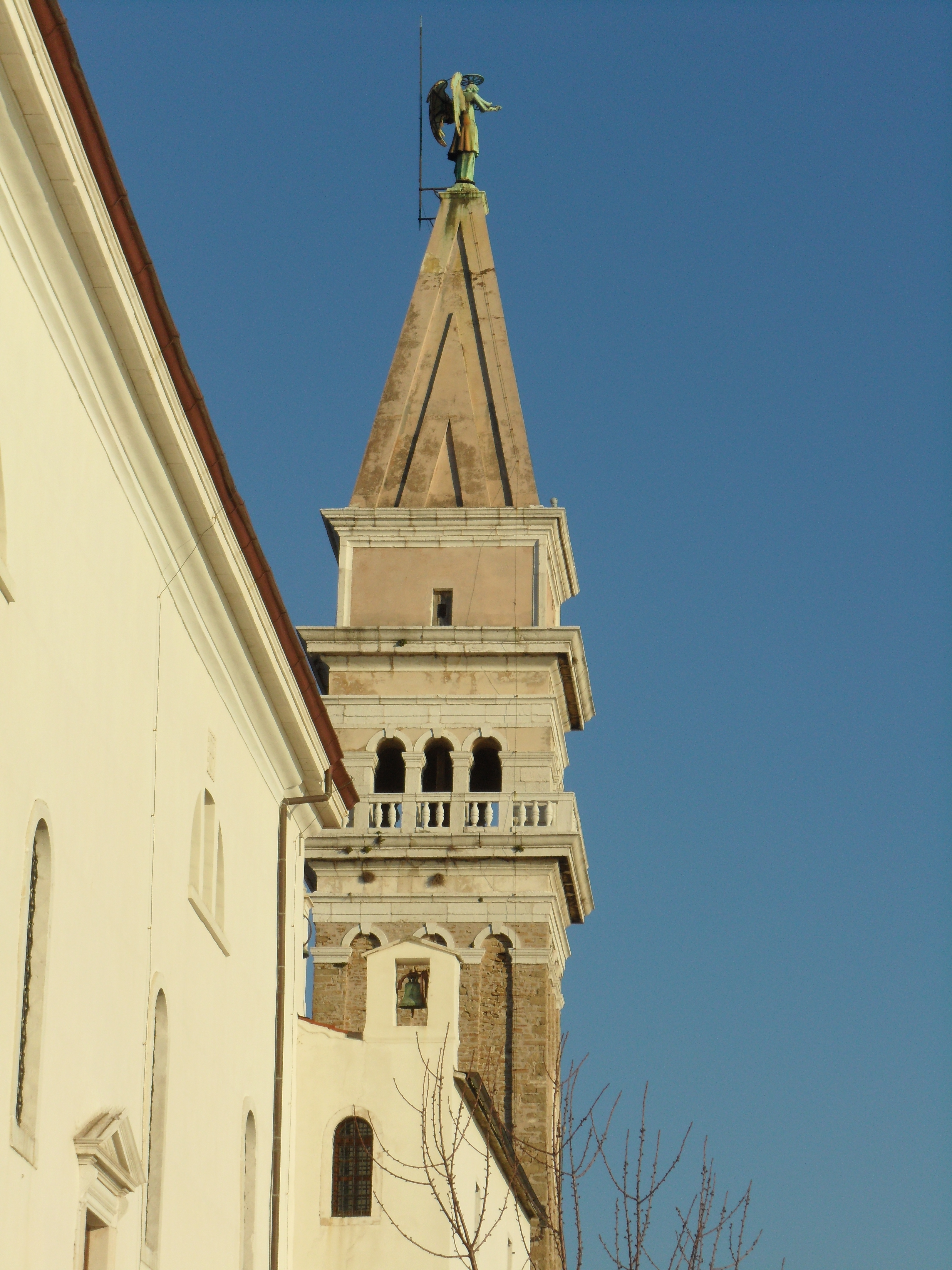 Zvonik cerkve sv. Jurija v Piranu.